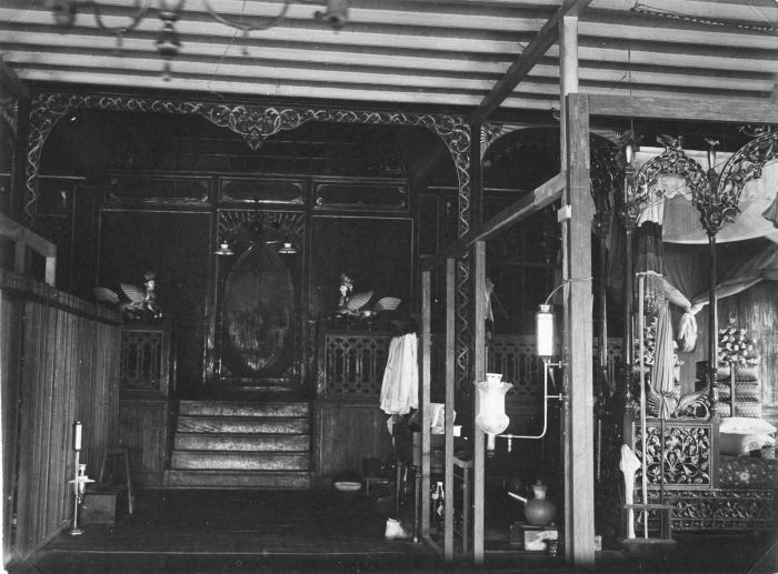 Foto. Het interieur van het paleis van de sultan in Pasir